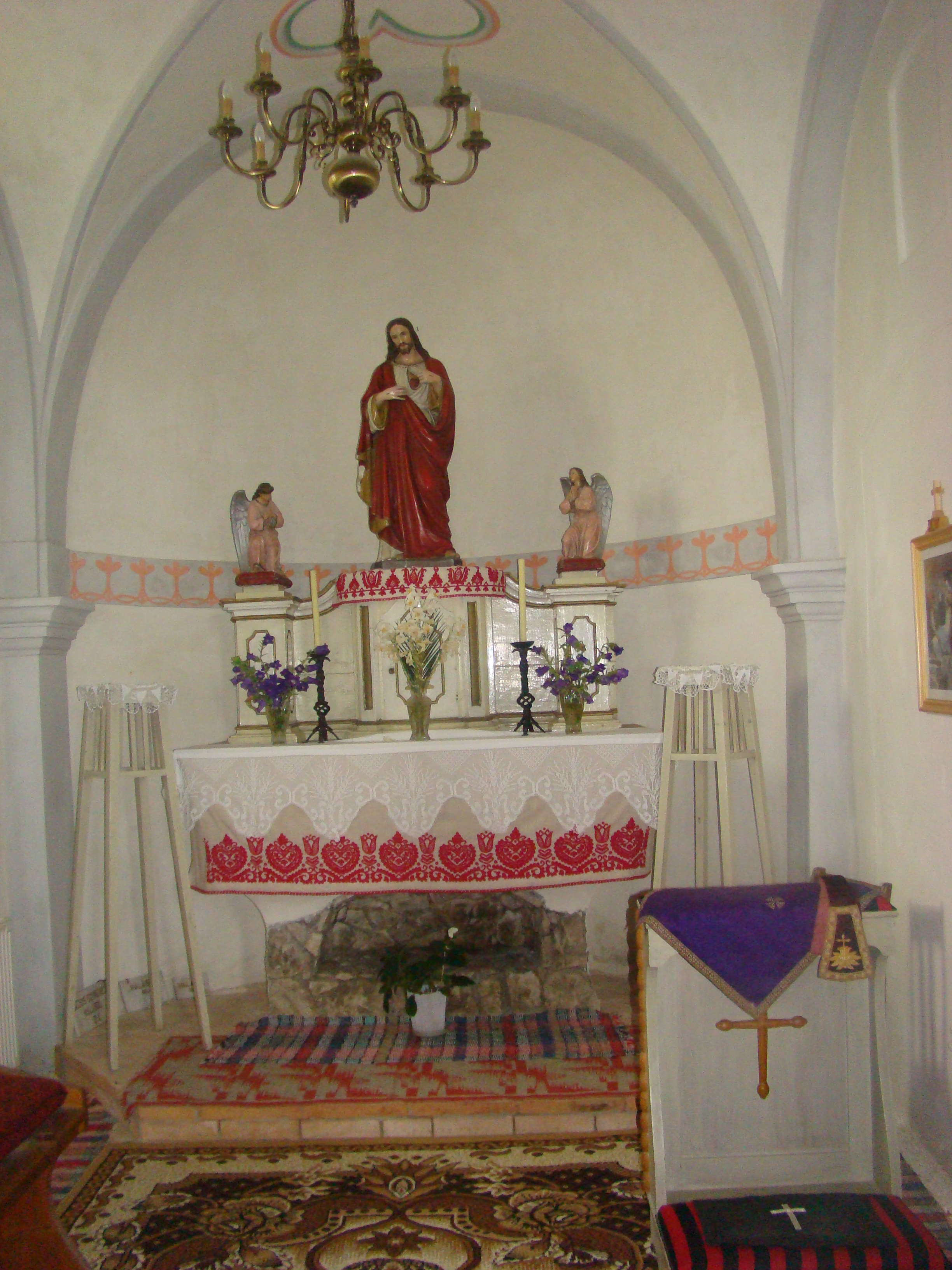 Lăzarea, județul Harghita